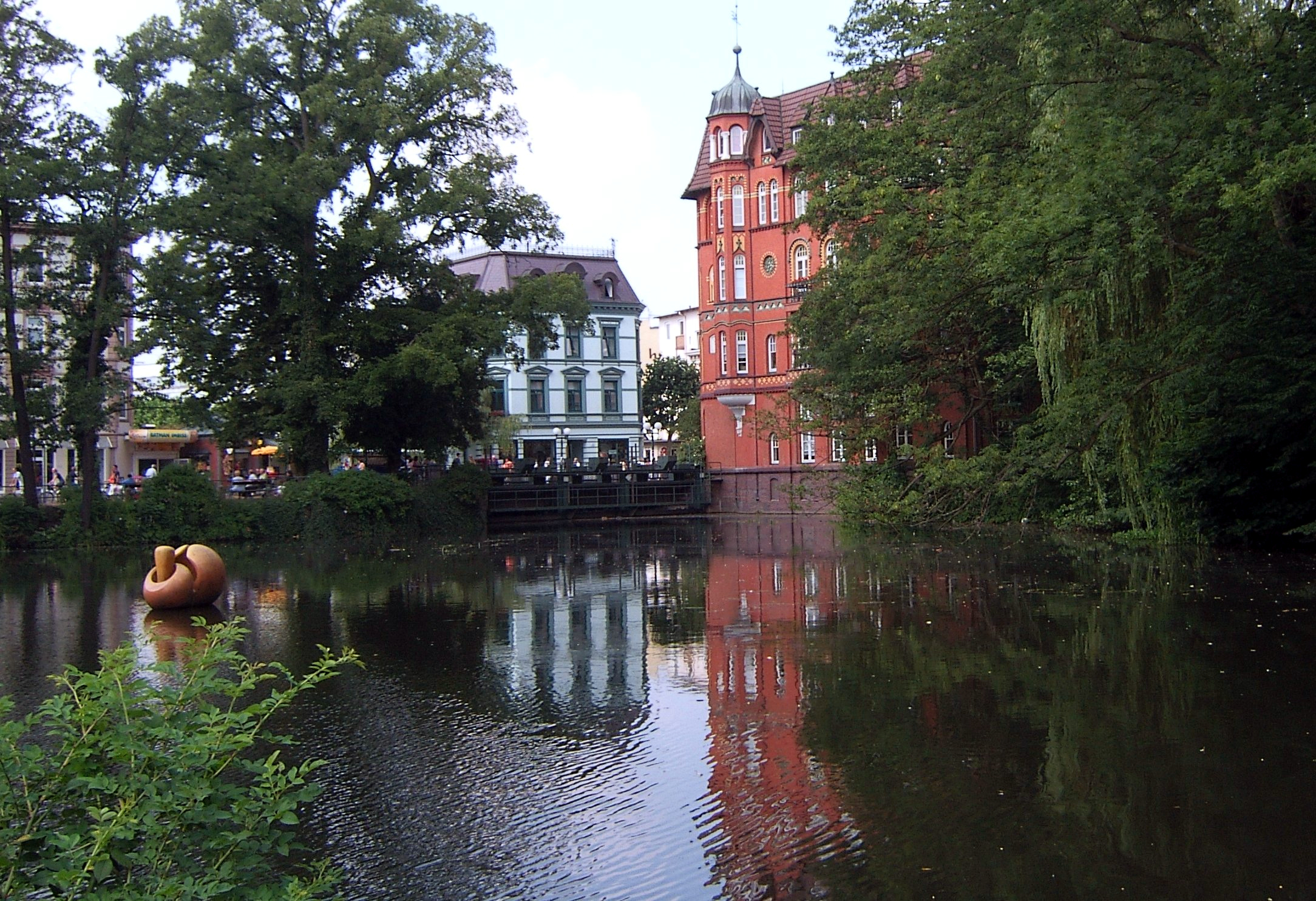 Die Bille wurde in Bergedorf 1208 für den Betrieb einer Kornwassermühle gestaut. Auf dem Mühlendamm verläuft die Alte Holstenstraße.